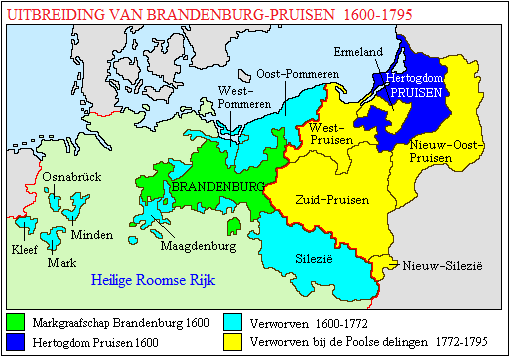 Uitbreiding Pruisisch grondgebied 1600-1795